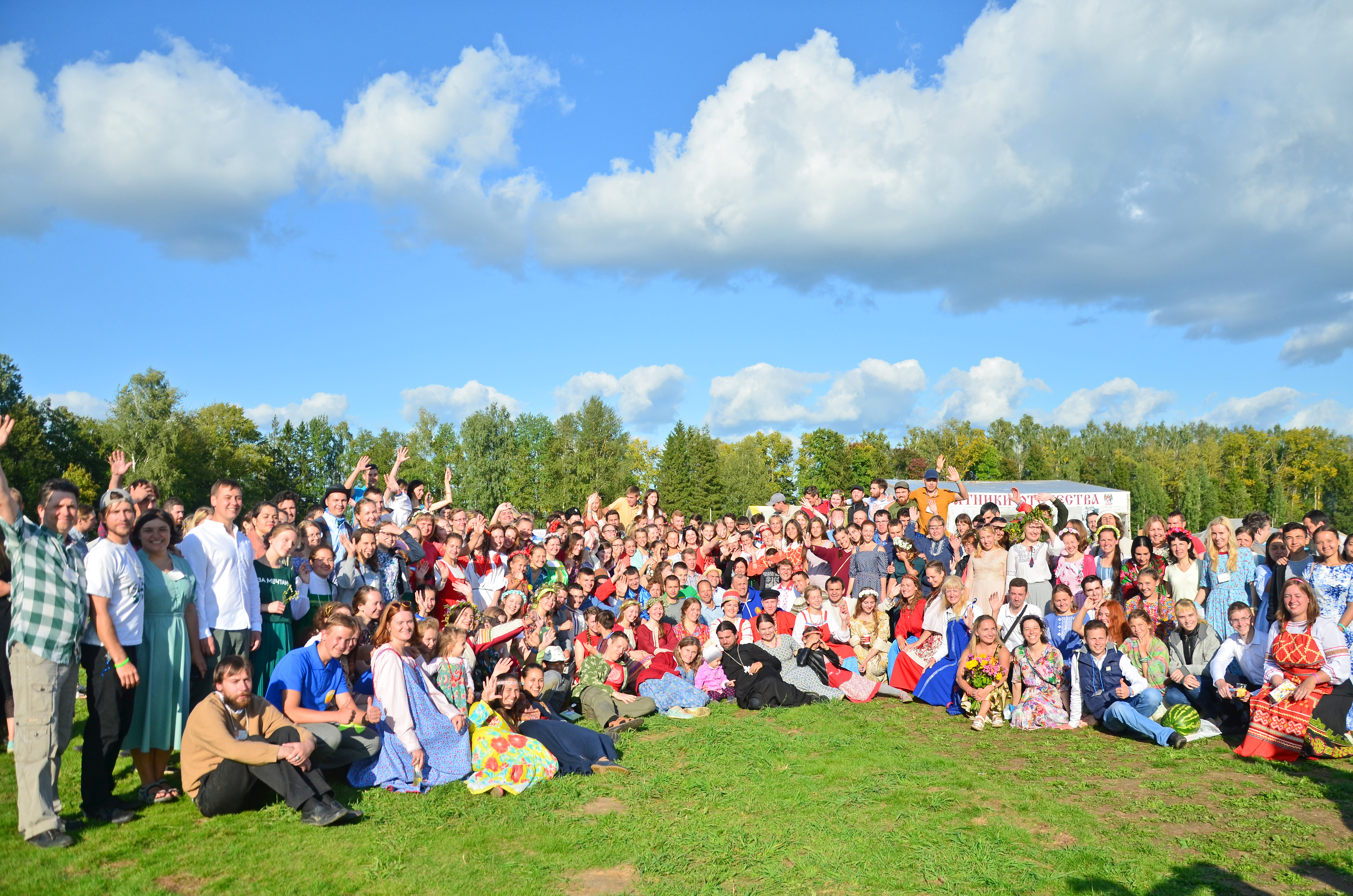 Общее фото участников фестиваля «Братья»